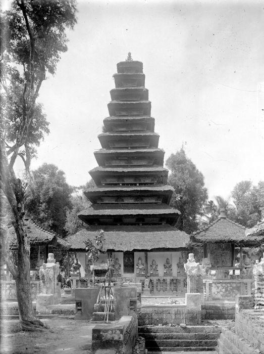 Negatief. Meru in de puri van de raja van Kesiman